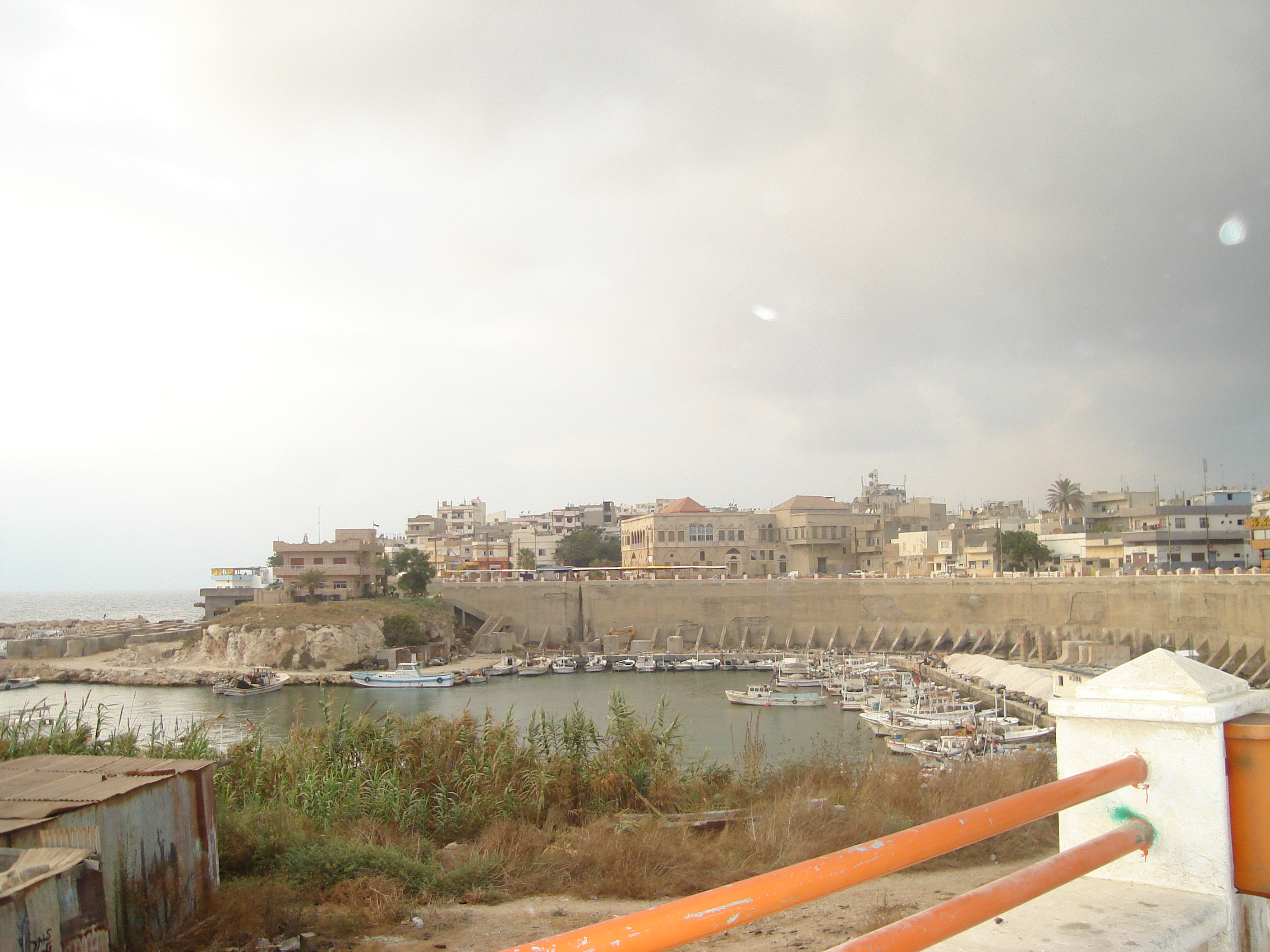 جبلة الميناء.